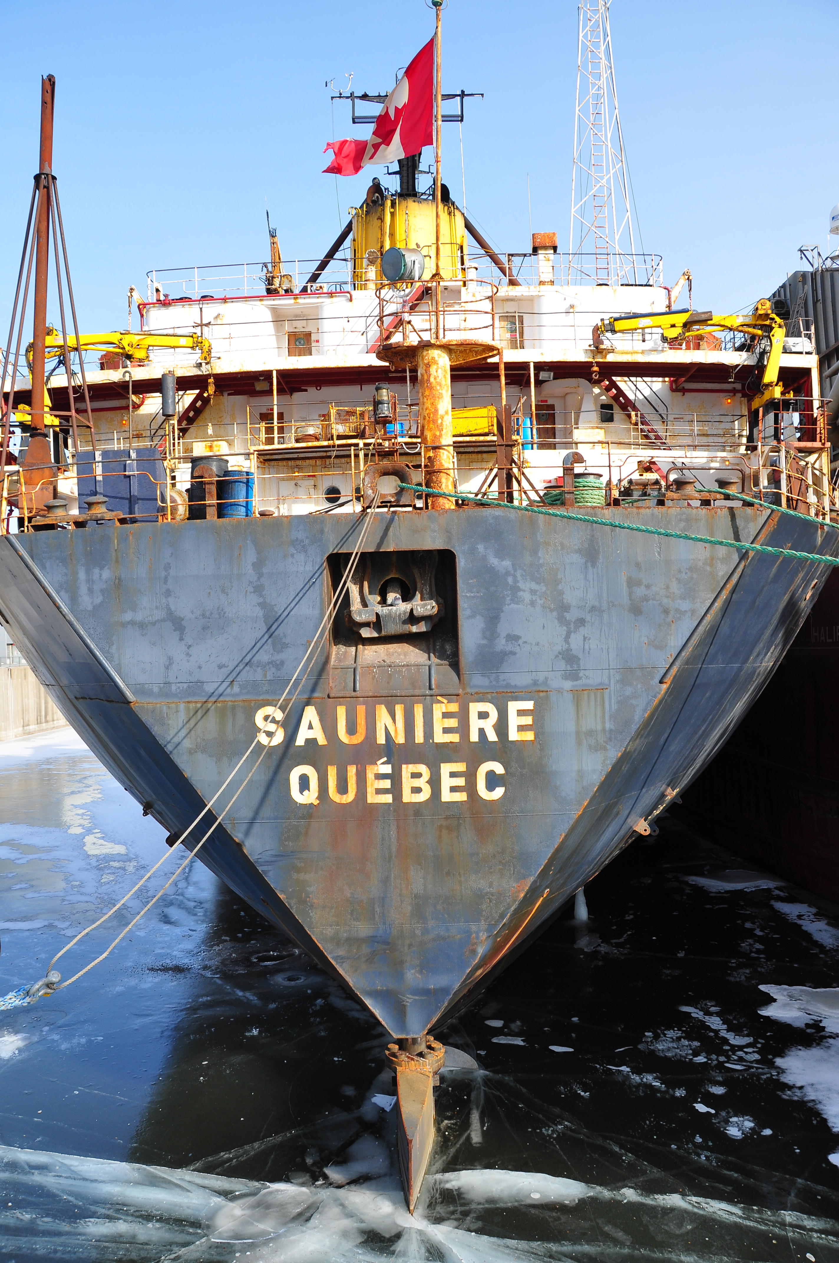 Algoma Central bulk carrier Sauniere moored in the Port de Montréal.